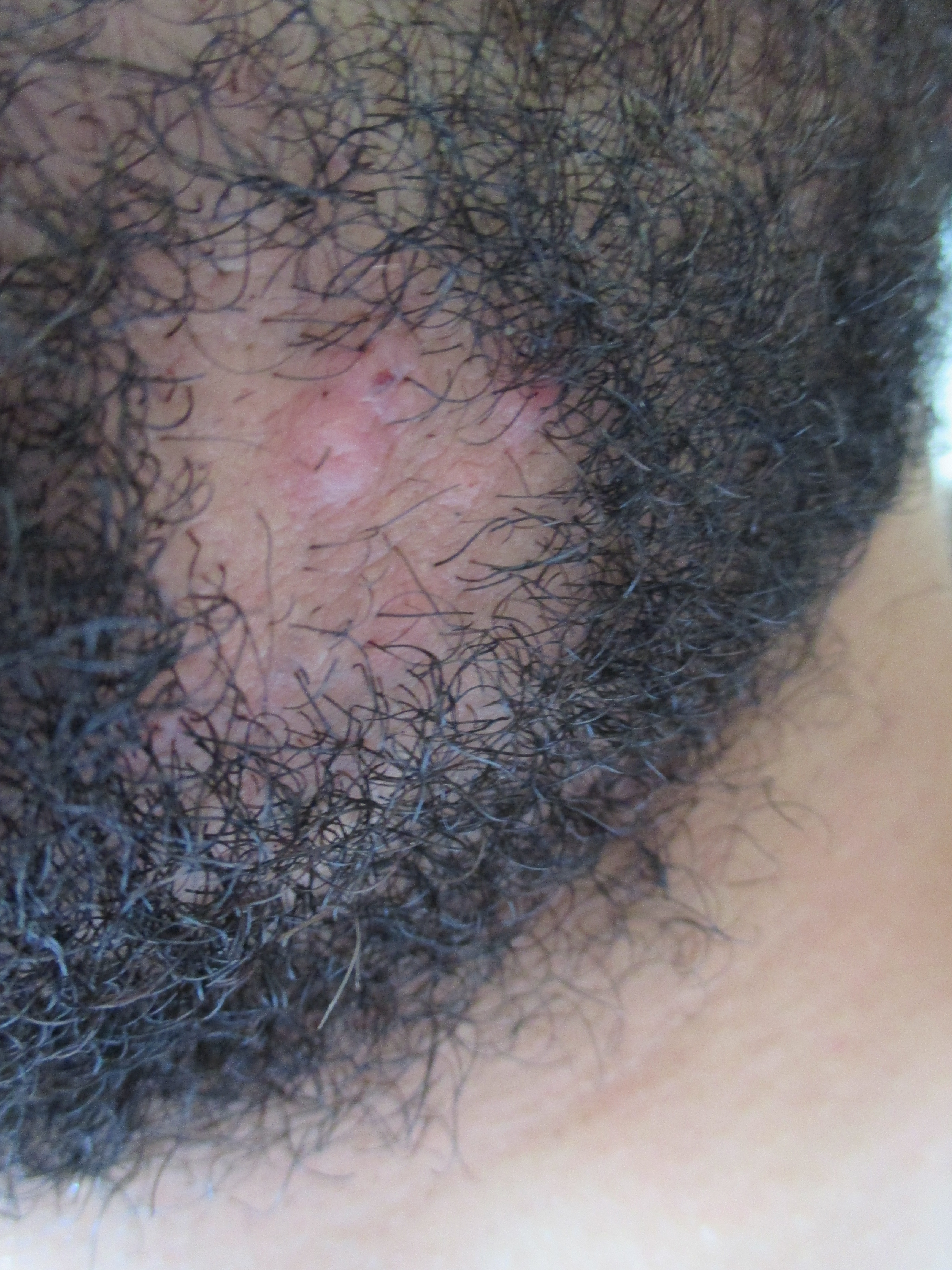 אובדן שיער בזקן בעקבות טריכוטילומניה